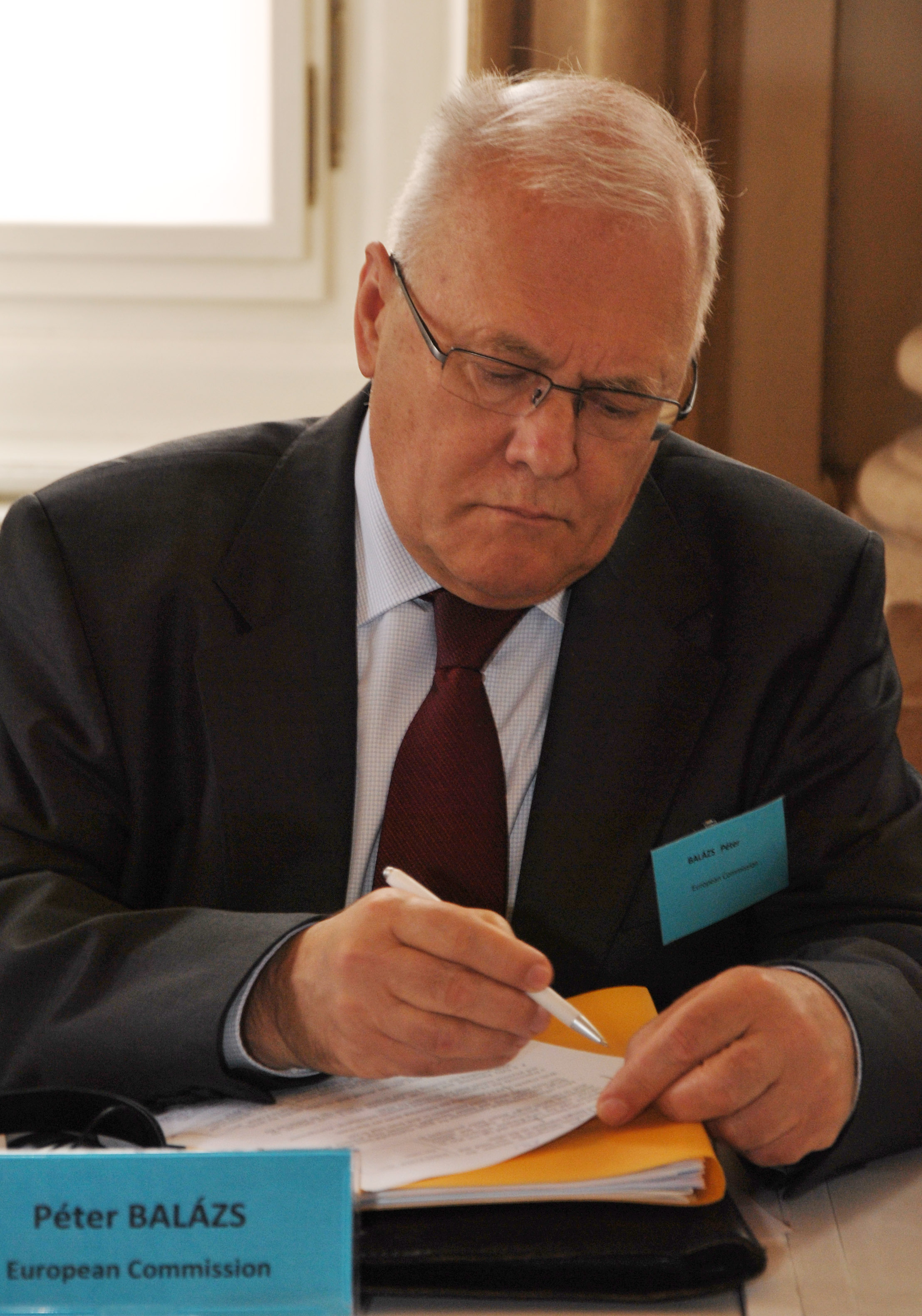 Péter Balázs